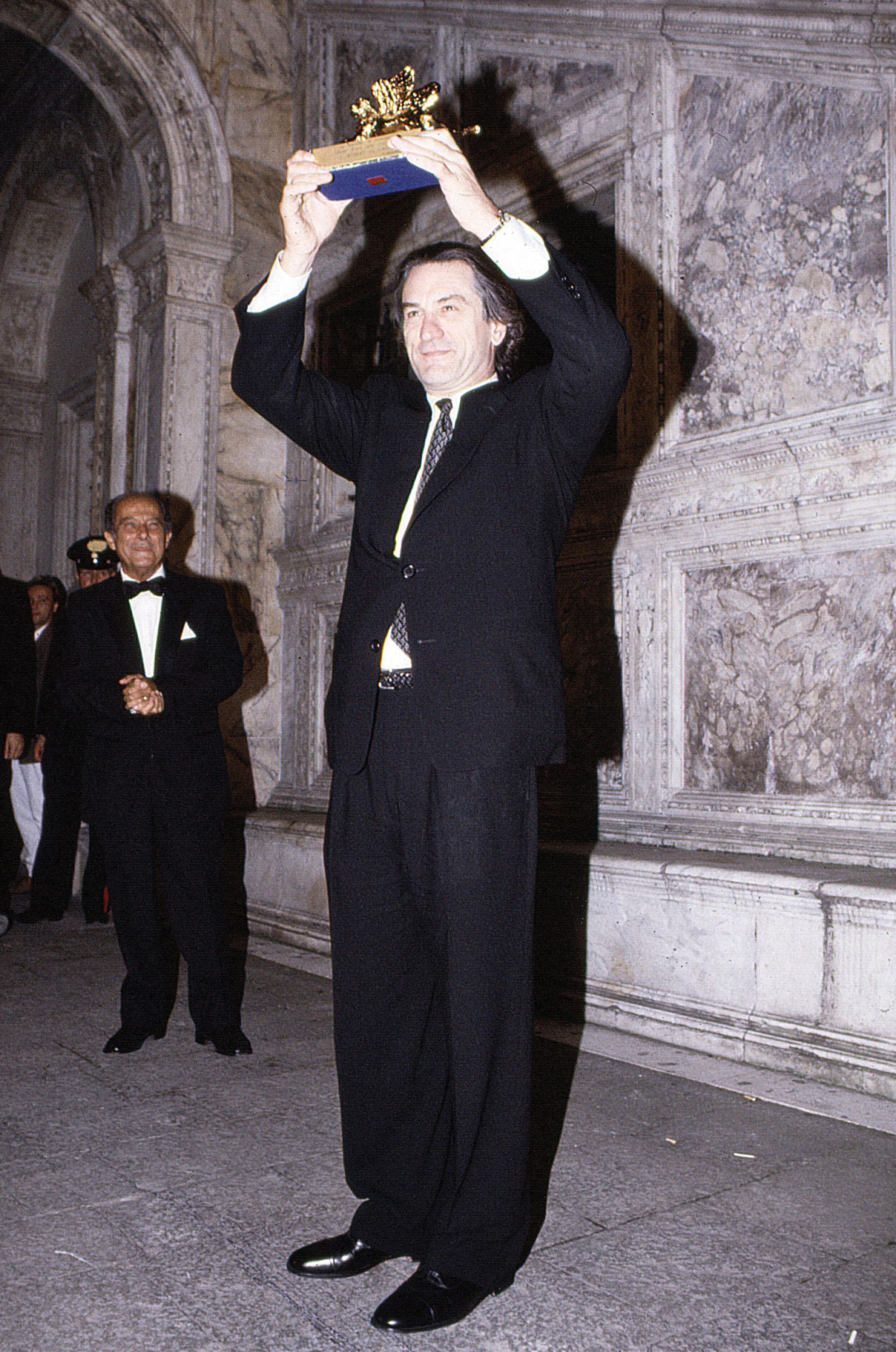 Robert De Niro nel 1993 alla Mostra del Cinema a Venezia